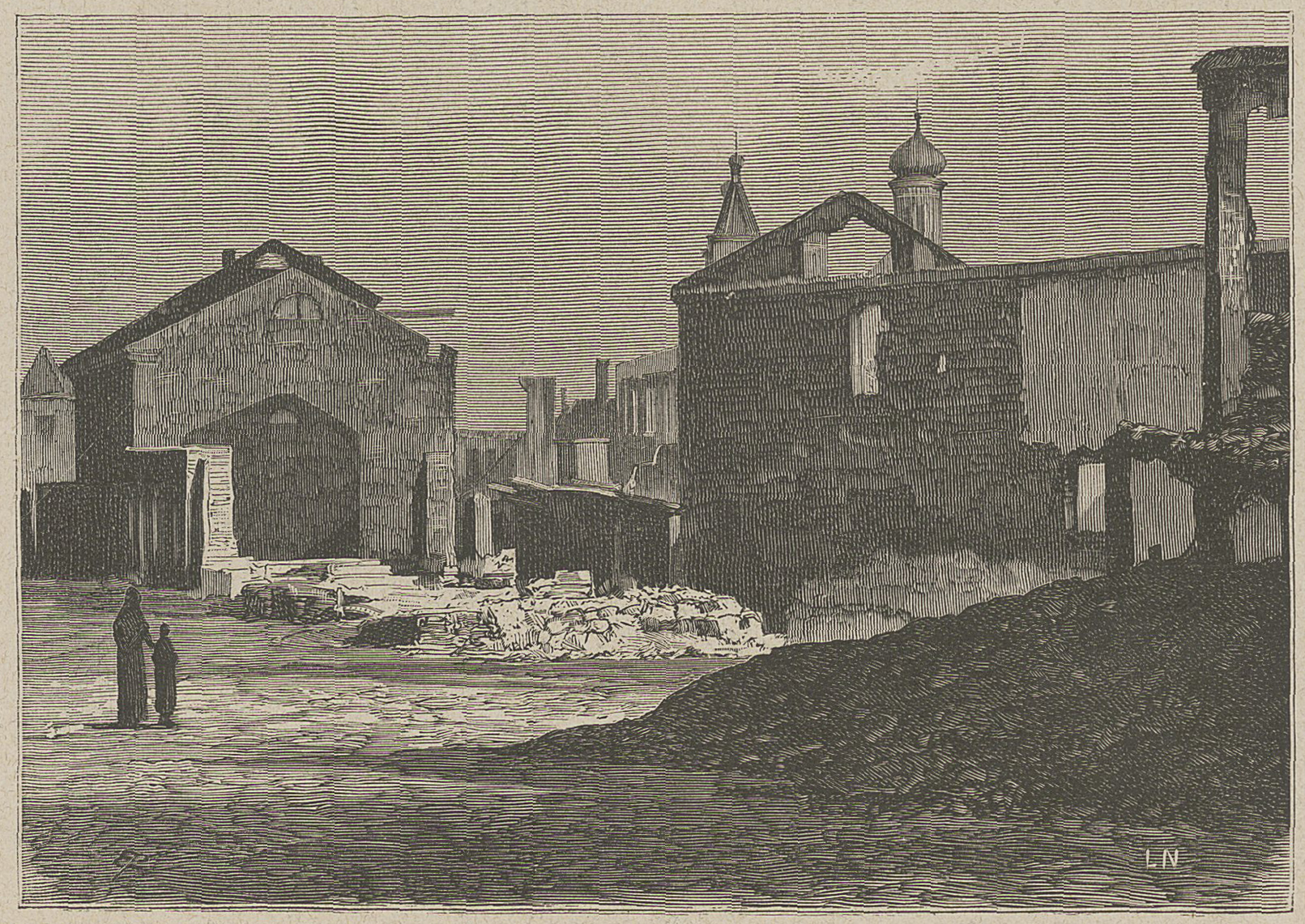 Беларуская (тарашкевіца): Менск (Miensk), вуліца Койданаўская (vulica Kojdanaŭskaja) па пажары